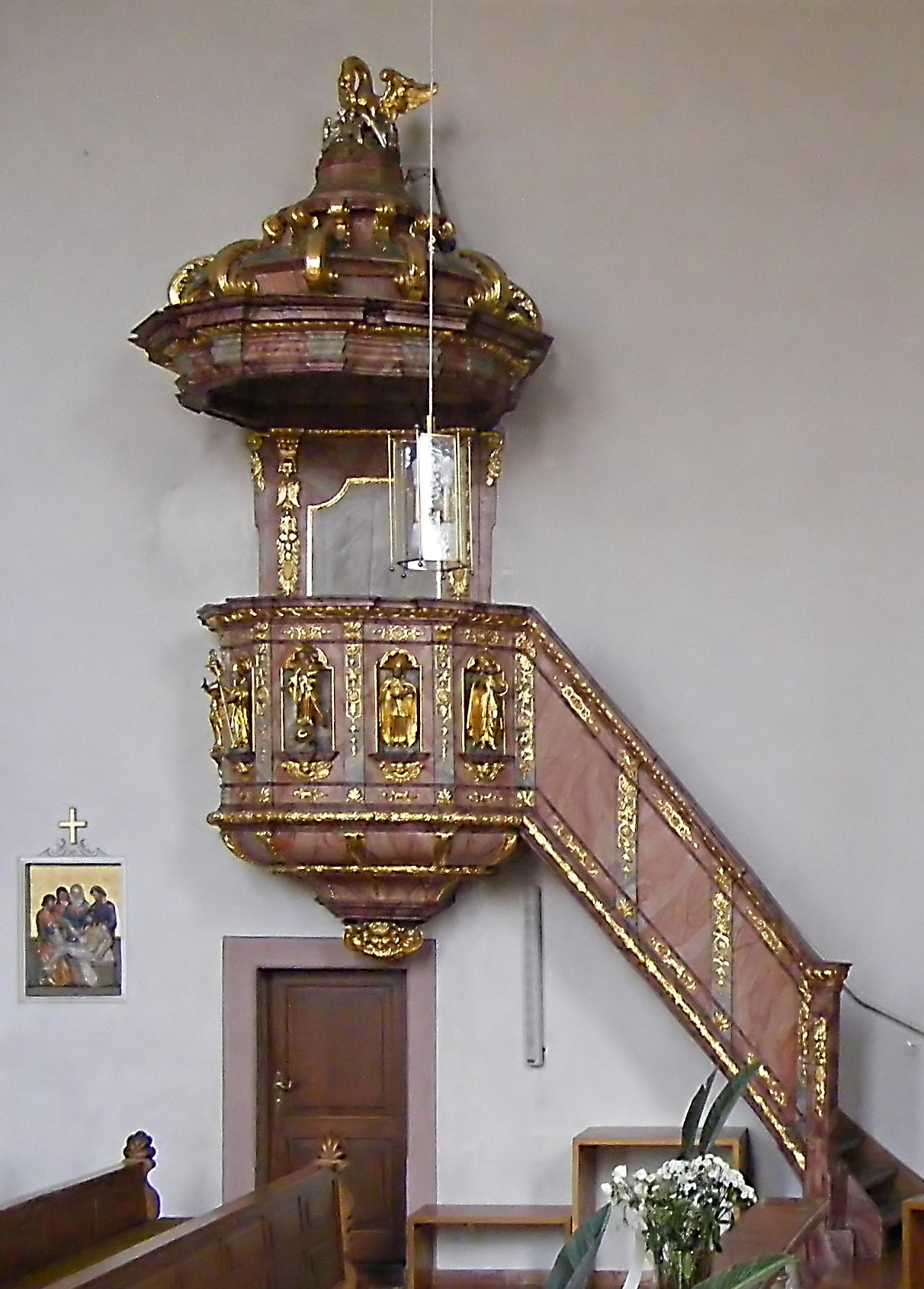 Kanzel im katholischen Teil der Laurentiuskirche (Dirmstein)